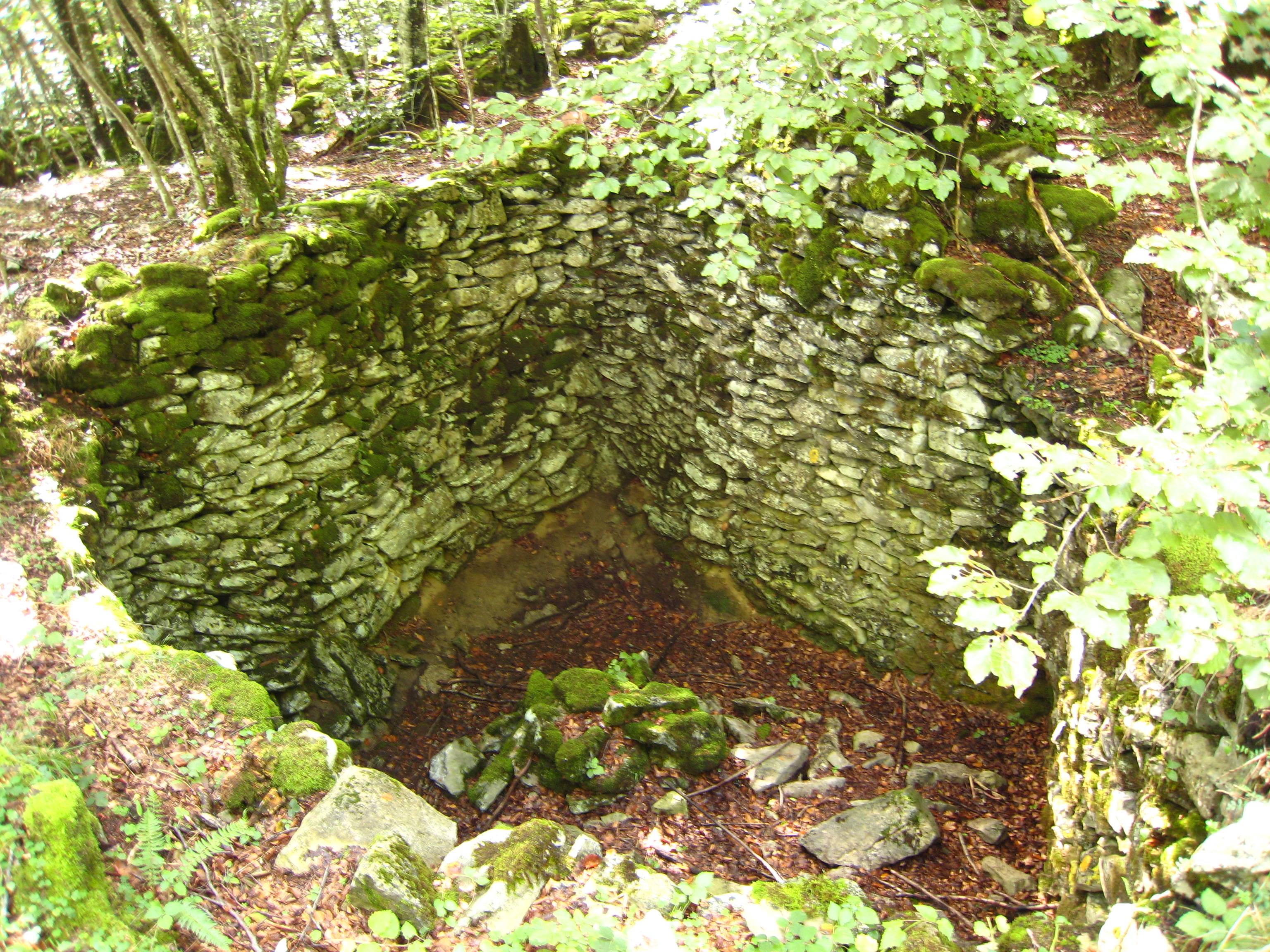 Vista del Valle de Losa, Burgos.